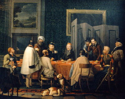 Il congresso di Parigi